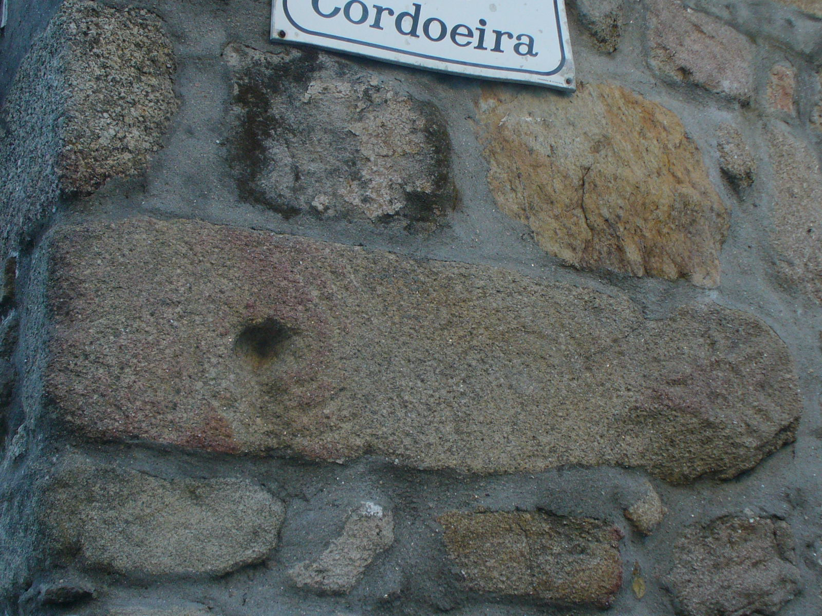 Mezepoka steleo en domomuro, Coia, Vigo